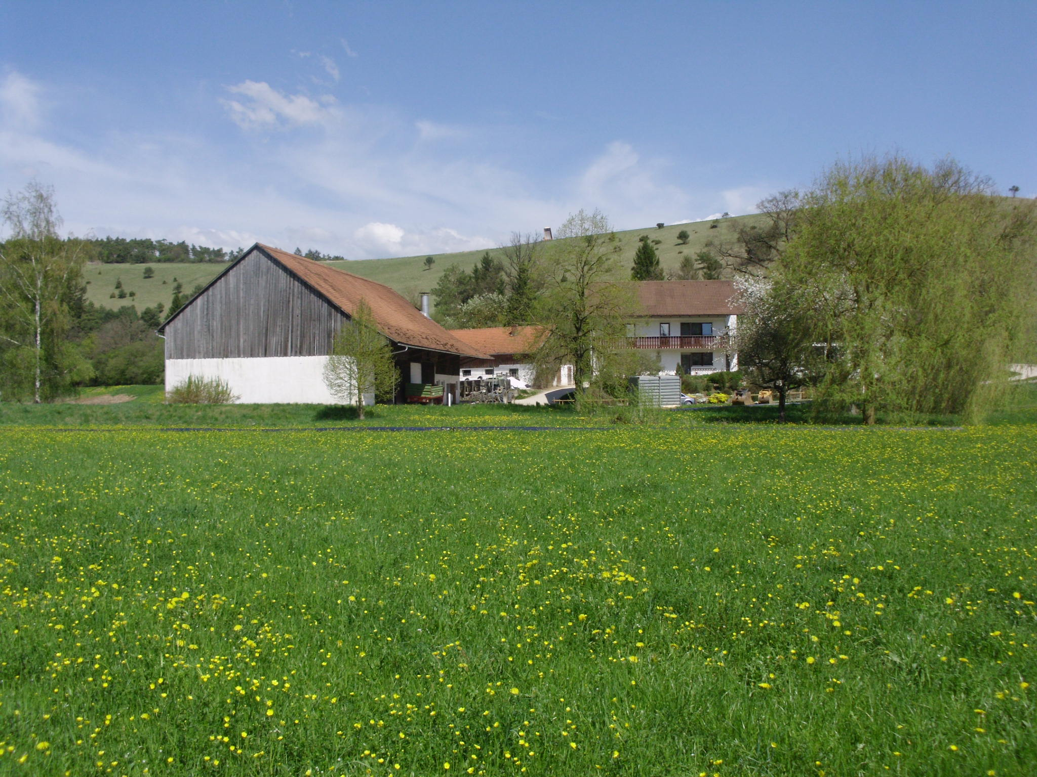 Hornmühle, Ortsteil des Marktes Titting im oberbayerischen Landkreis Eichstätt